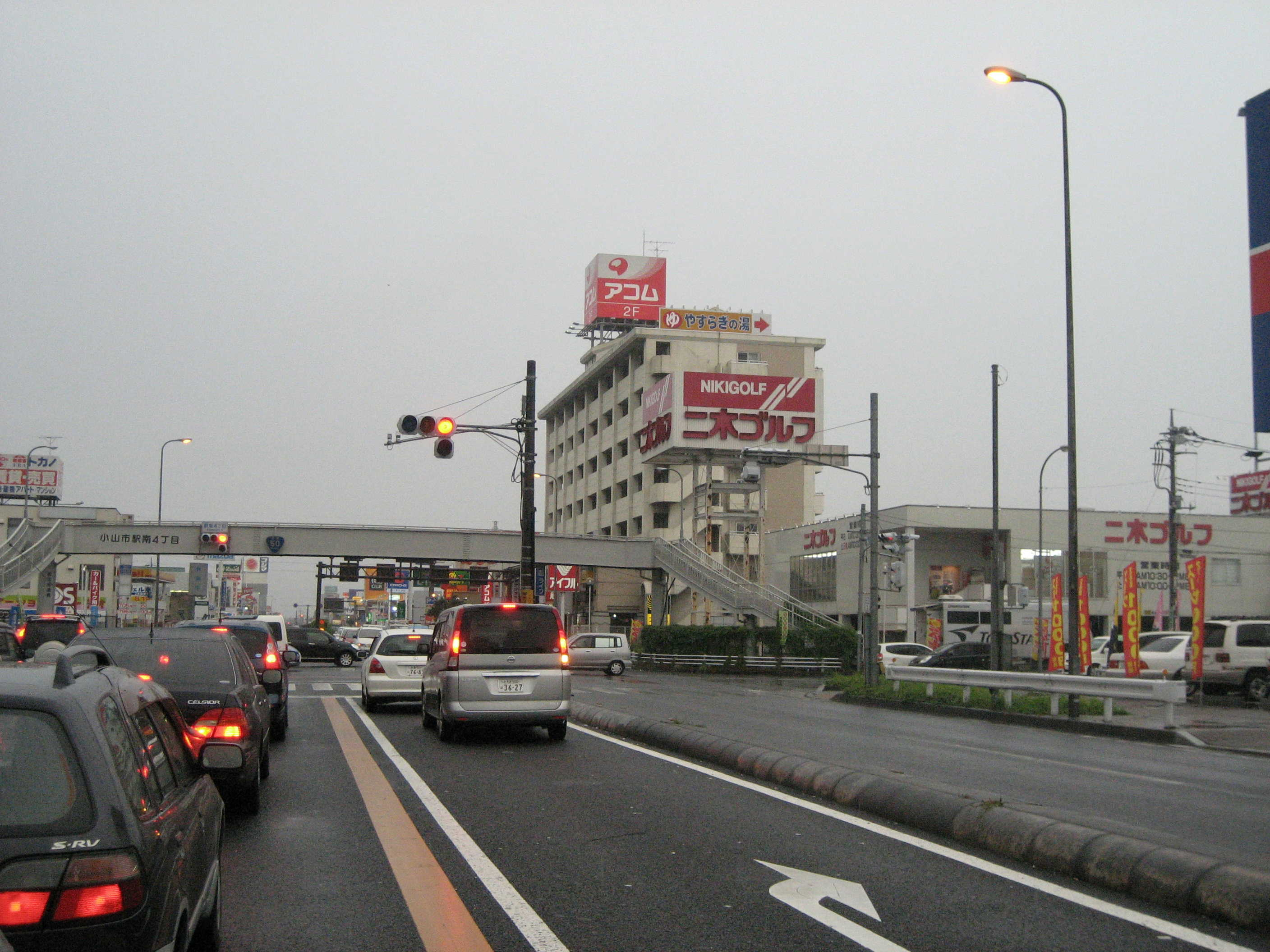 国道50号線小山市内